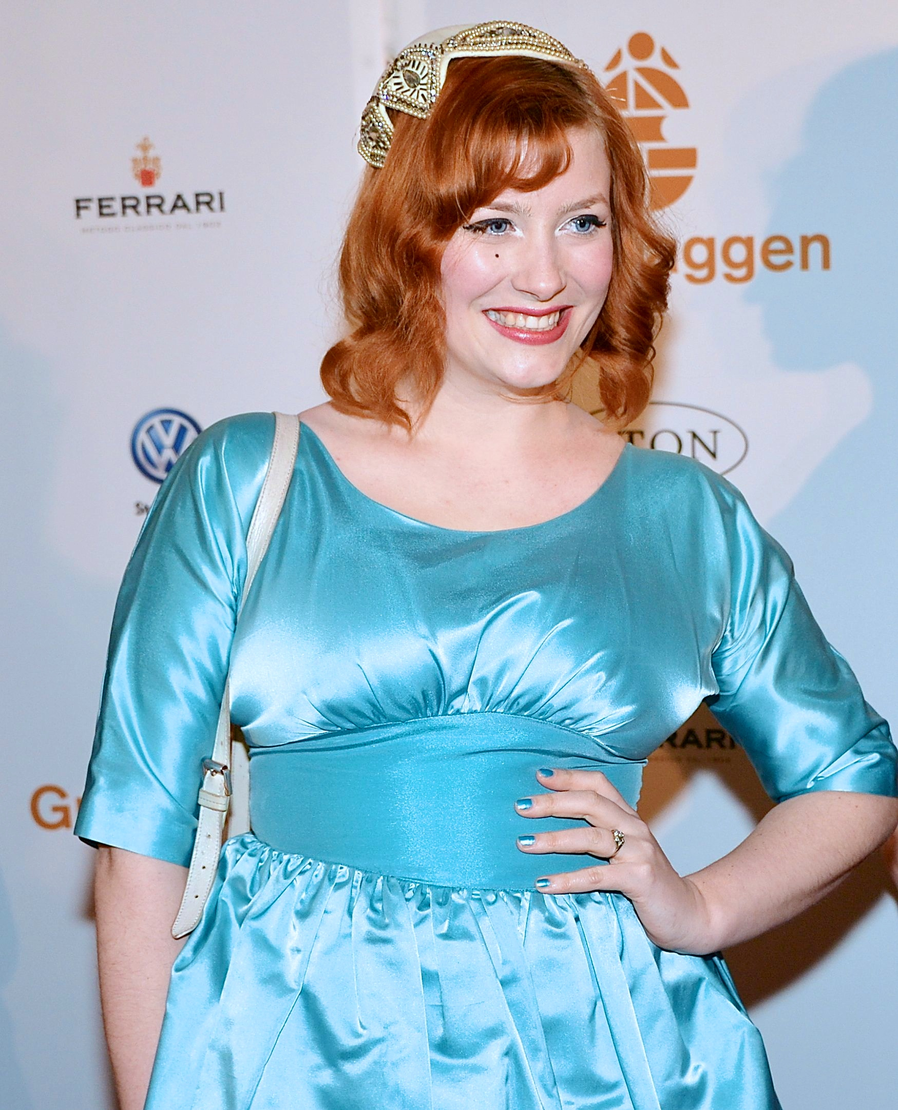 Elsa Billgren på på Guldbaggegalan 2013 den 21 januari 2013.